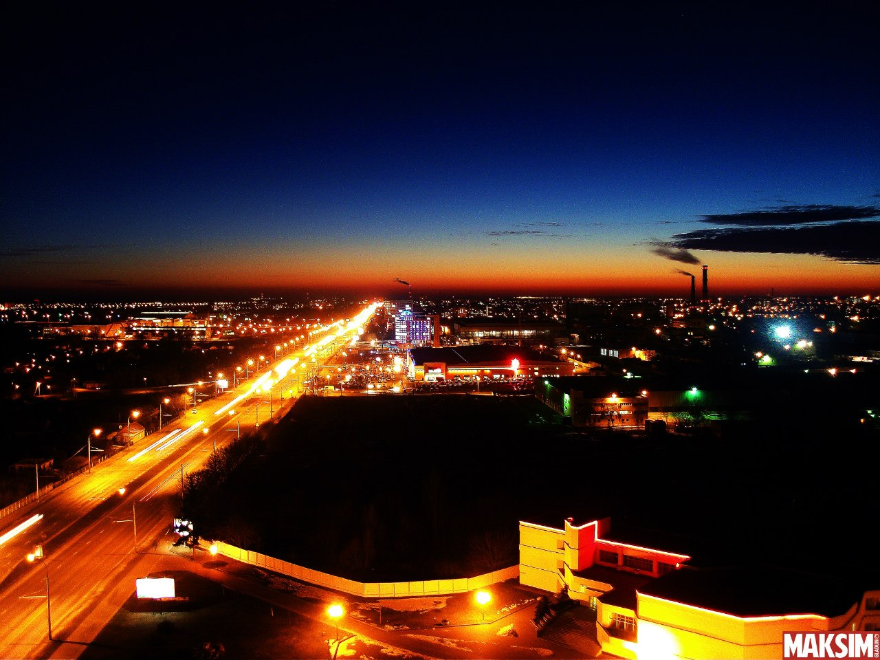 панорама улицы Московской